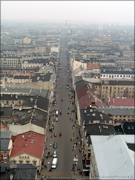 Lodz - ul. Piotrkowska widok w strone północną